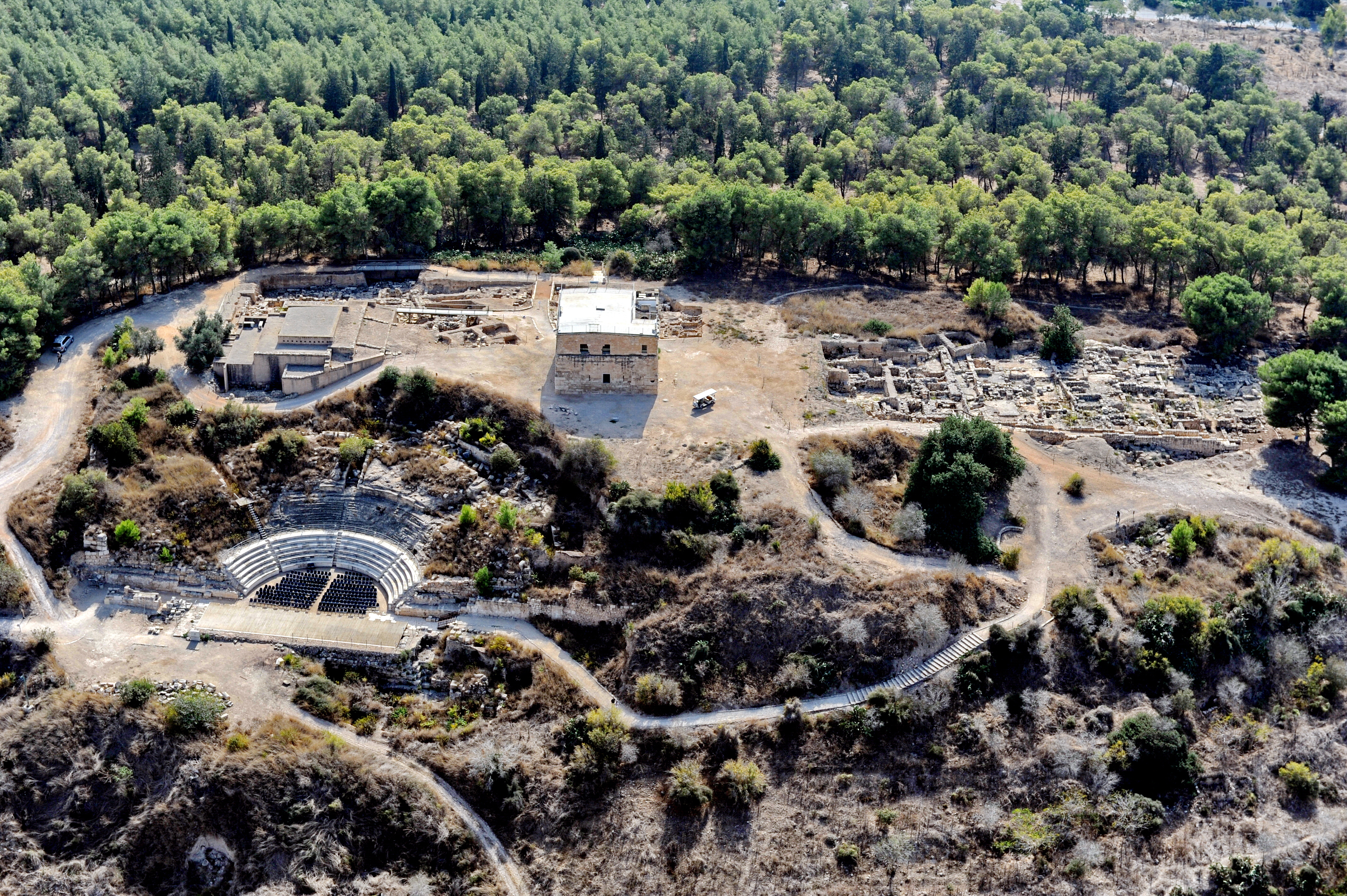 צִיפּוֹרִי הייתה עיר עתיקה במרכז הגליל התחתון, חמישה קילומטרים מצפון מערב לנצרת. יישוב היה קיים במקום כבר בתקופת הברזל II, ועיר יהודית התקיימה בו מתקופת החשמונאים ועד המאה ה-5 לספירה, כאשר יהודים ישבו באזור עד המאה ה-10. אתר ציפורי הוא גן לאומי המשתרע על שטח של כ-16 קמ"ר. הגן נפתח לציבור בשנת 1992. החפירות בגן טרם הסתיימו.